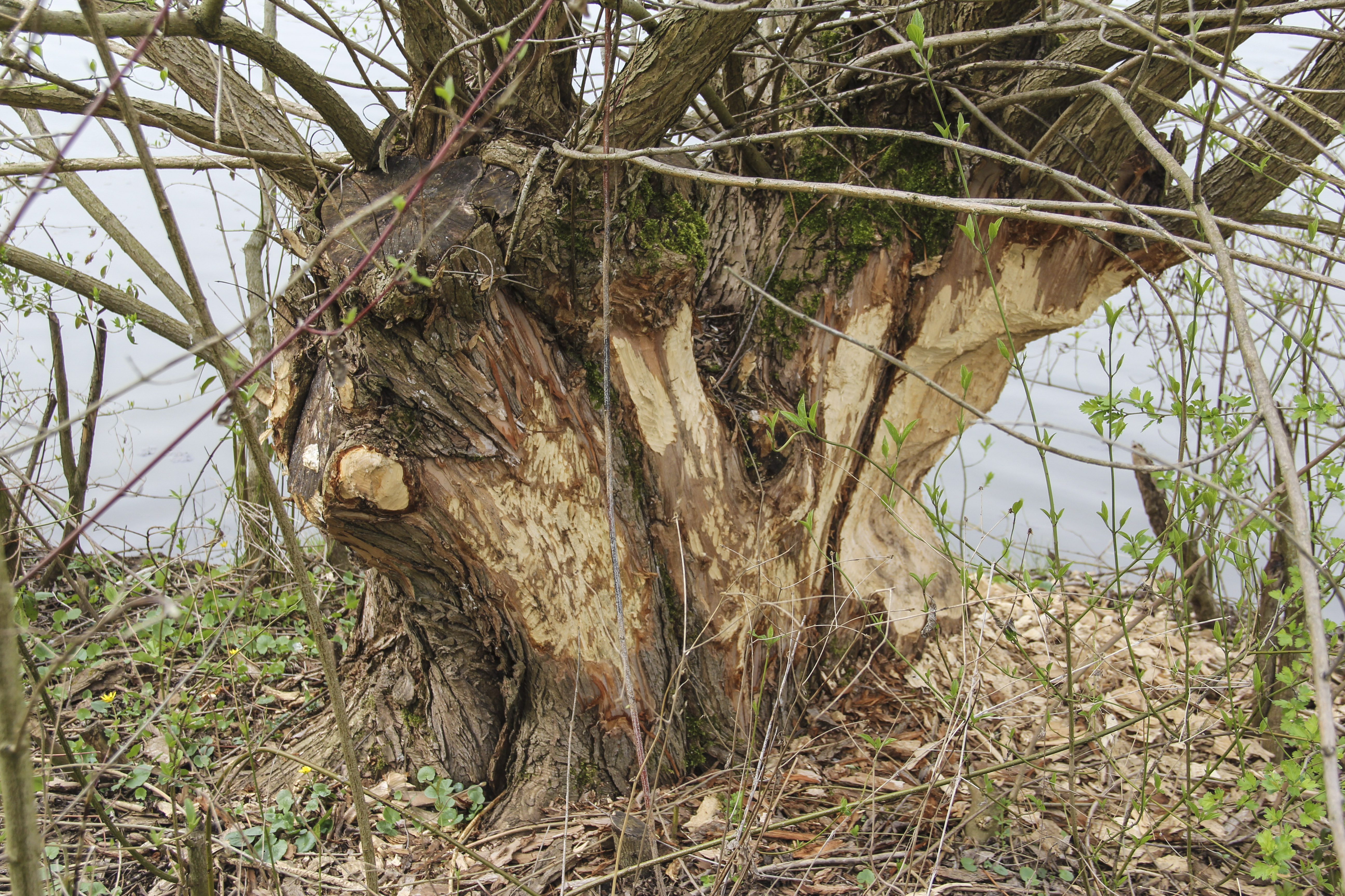 Hahnenkammsee